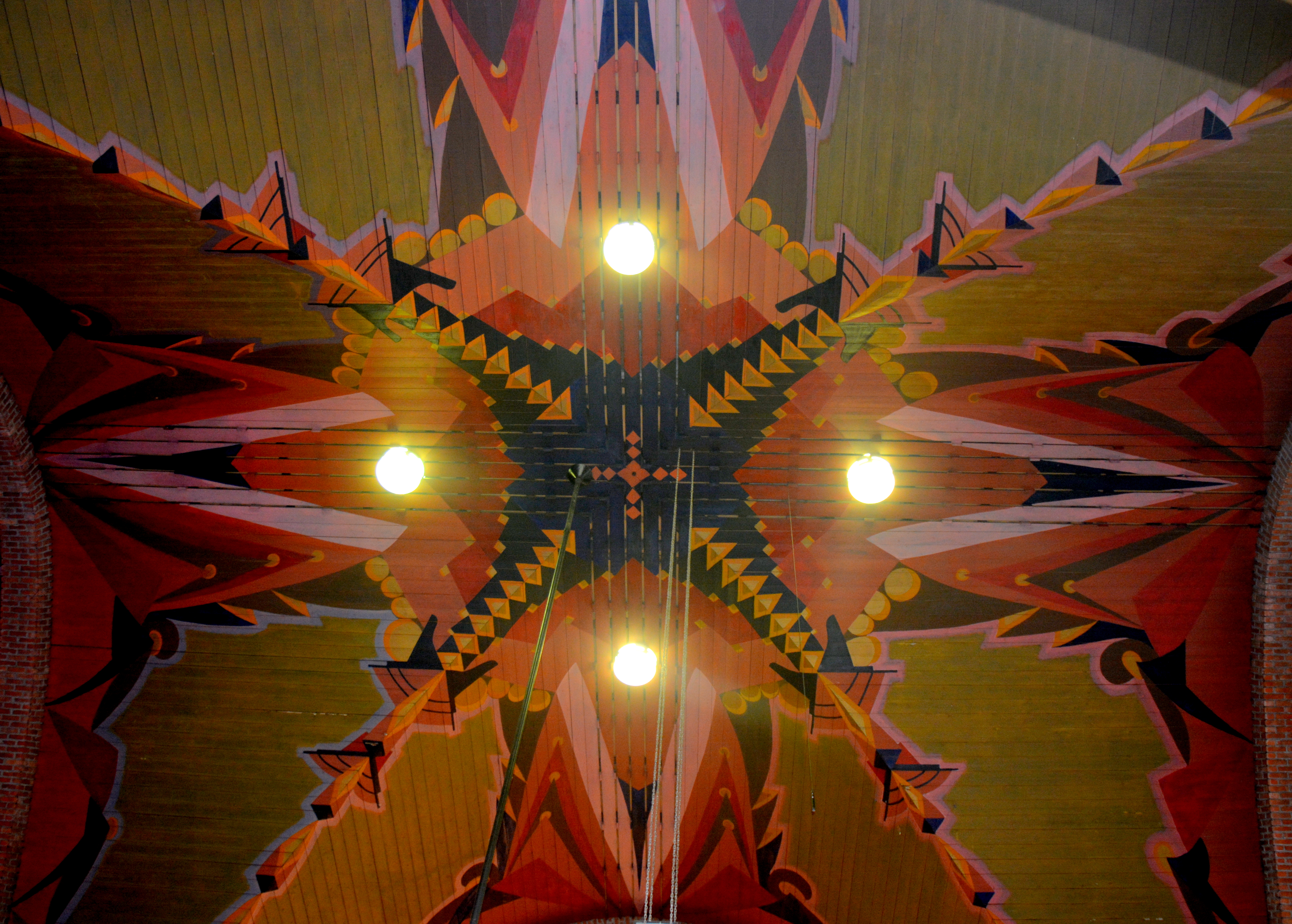 Kollum, geref. Oosterkerk, plafond